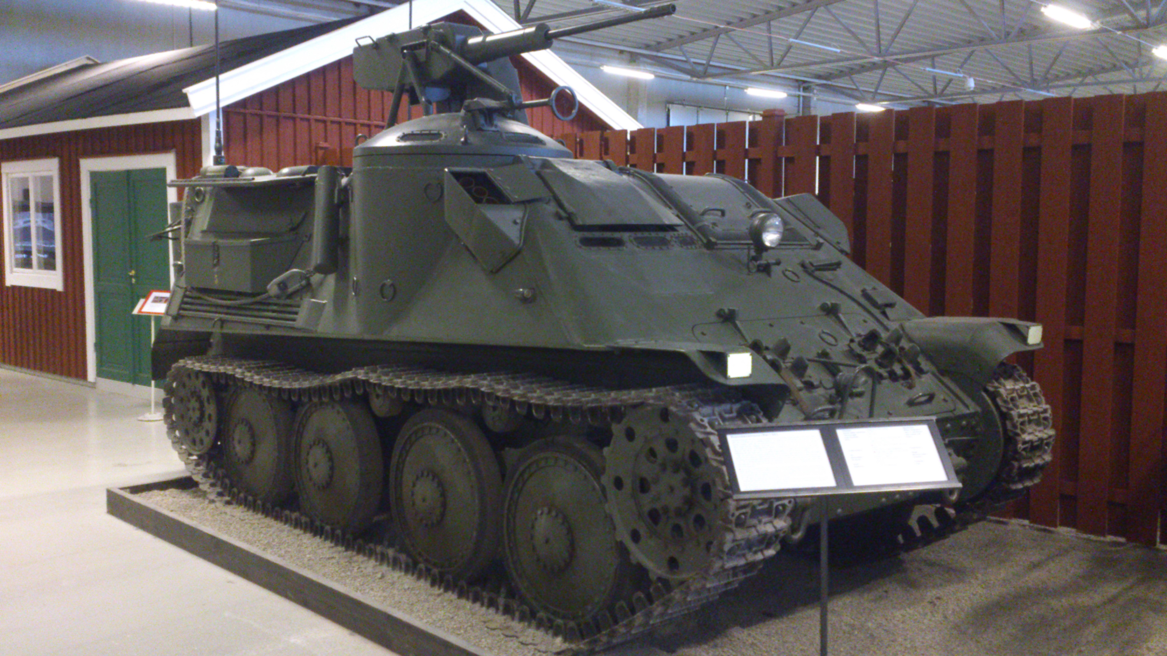 Pansarbandvagn 301 på Försvarsfordonsmuseet Arsenalen i Strängnäs